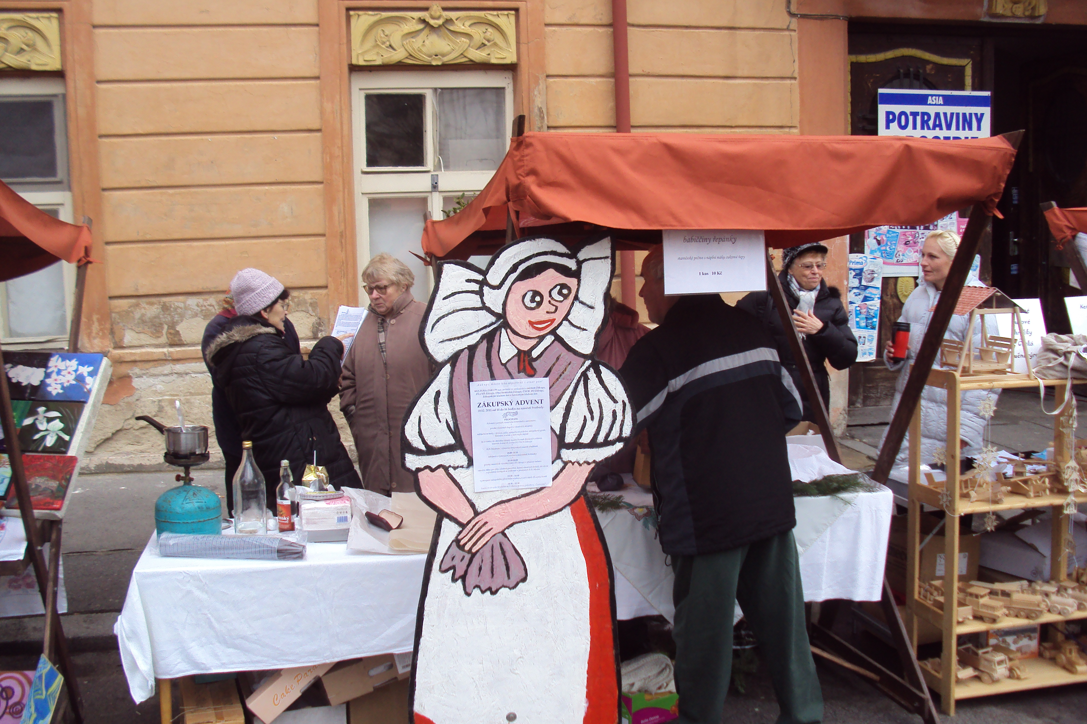 Adventní slavnost na náměstí, stánek zákupských baráčníků